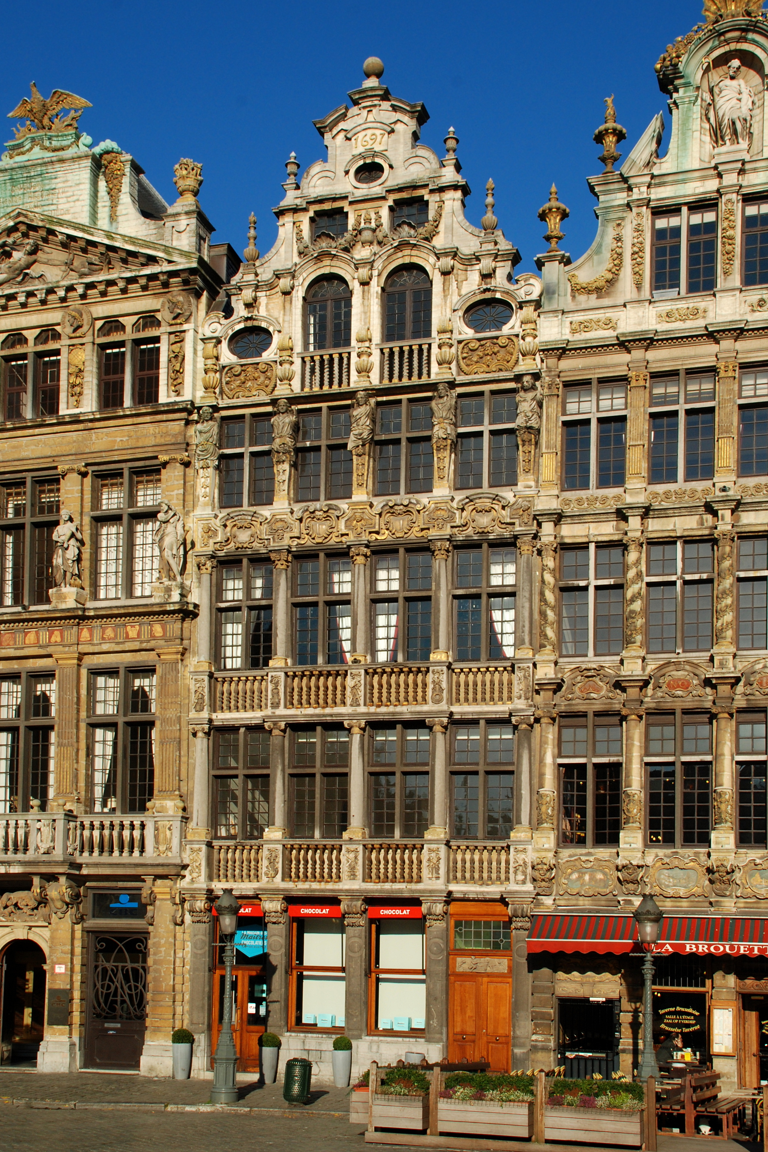 Belgique - Bruxelles - Grand-Place - Maison du Sac